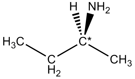 (S)-2-butanamida